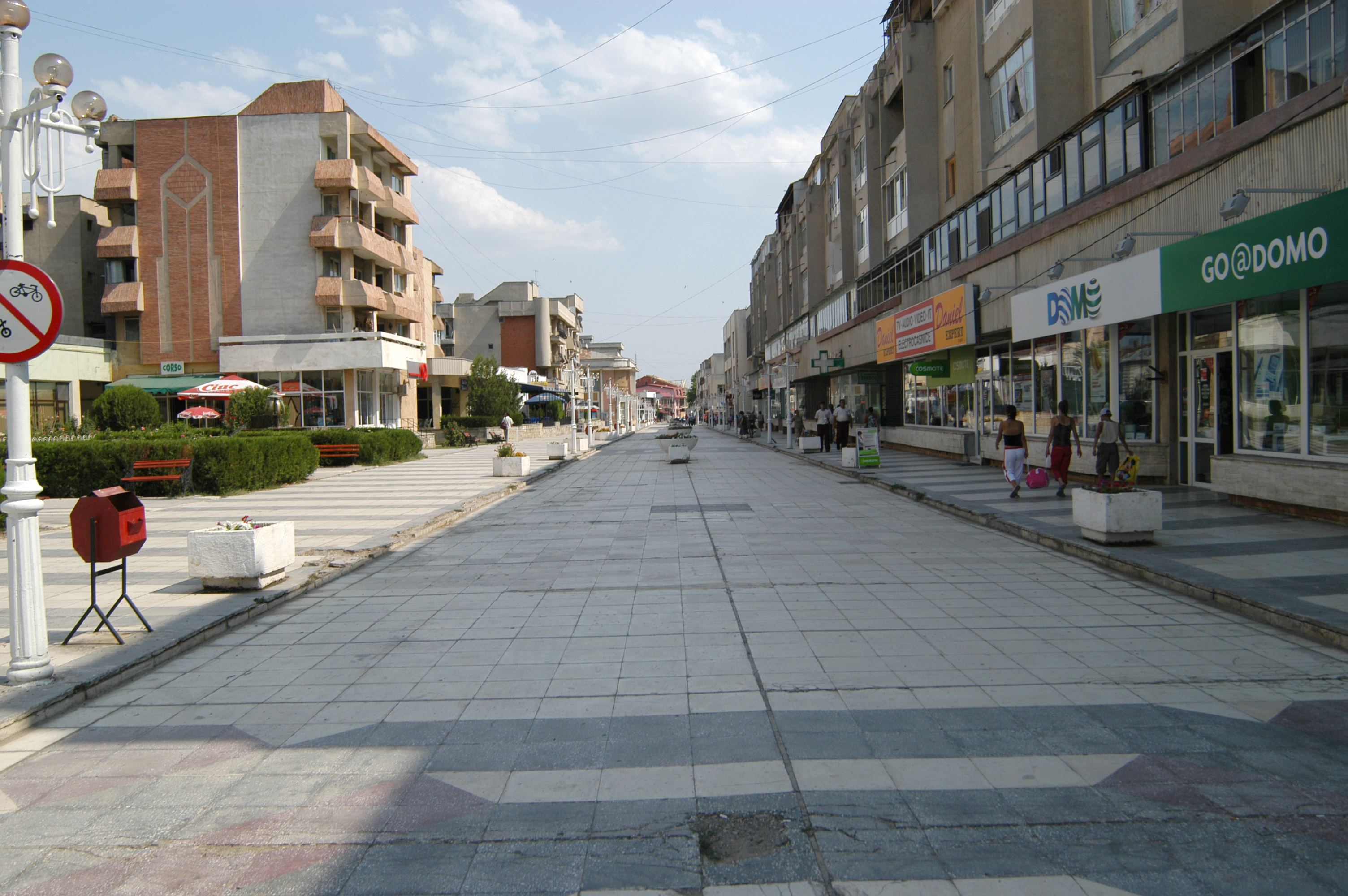 The main promenade in Râmnicu Sărat, Romania